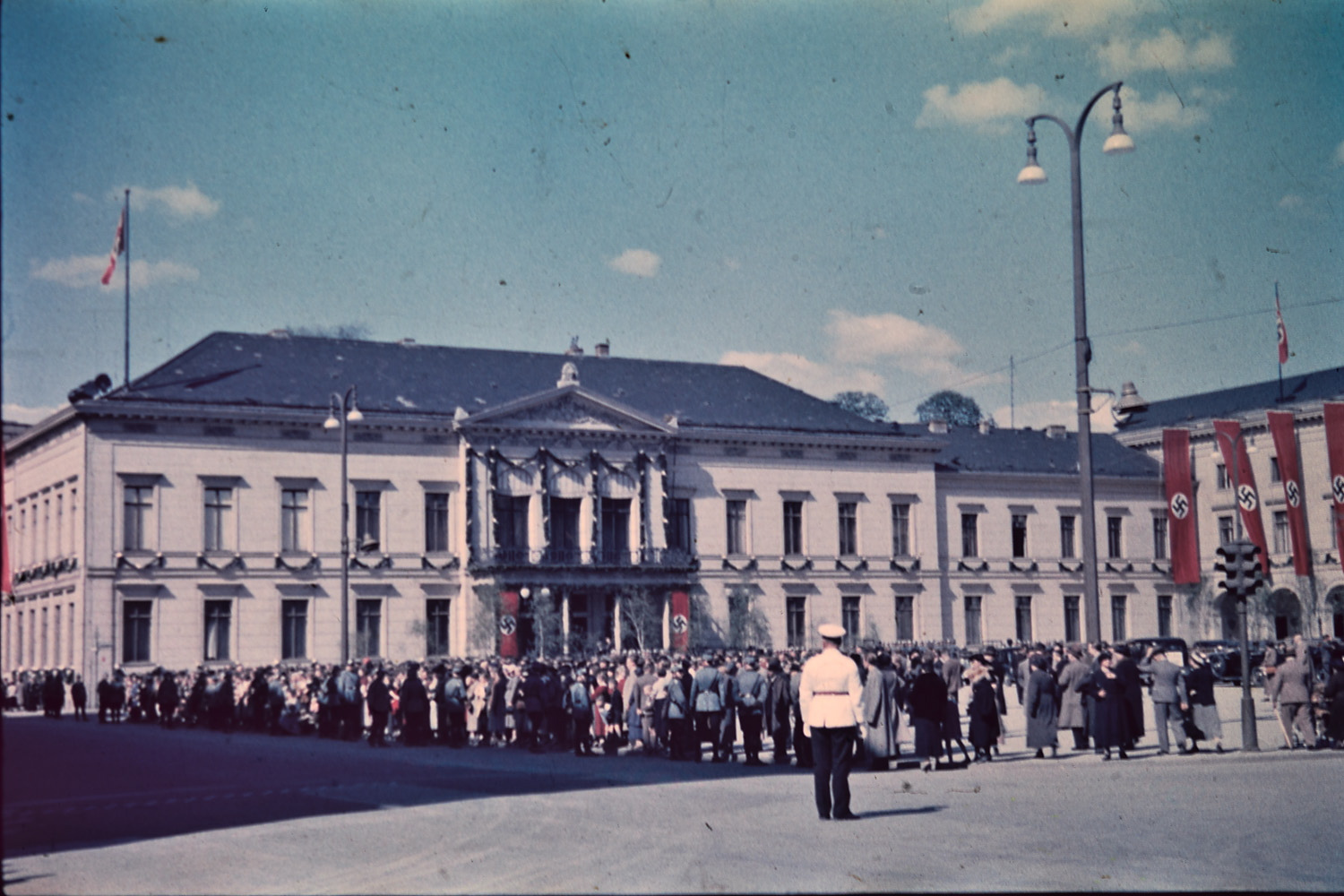 Bildet er hentet fra Arkivverket. Pyntede gater i Berlin, Arbeidets dag 1. mai. Berlins 700 års jubileum. Store folkemengder, flagg med hakekors. Fotograf: Thomas Neumann År: 1937 Kamera: Leica Film: Agfa color neu Arkivreferanse: PA1456Ub1_1_1_37 Arkivinstitusjon : Riksarkivet Arkivnavn : Neumann, Thomas Sted : Tyskland, Berlin, Berlin, Emneord: Bymiljø Avbildet